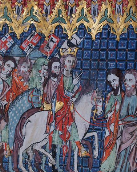 Alfonso XI y sus nobles. Miniatura del Libro de la Coronación de los Reyes de Castilla, realizado en el siglo XIV y conservado actualmente en la Real Biblioteca de San Lorenzo de El Escorial, (España).